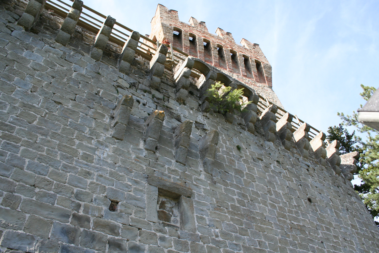 Apparato sporgente a tre ordini di mensole sovrapposte che sovrasta l'ingresso al recinto murario della Rocca di Arquata del Tronto, in provincia di Ascoli Piceno.